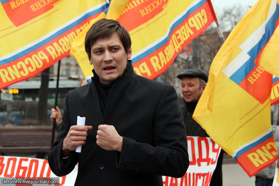 Дмитрий Гудков на пикете в защиту прав журналистов